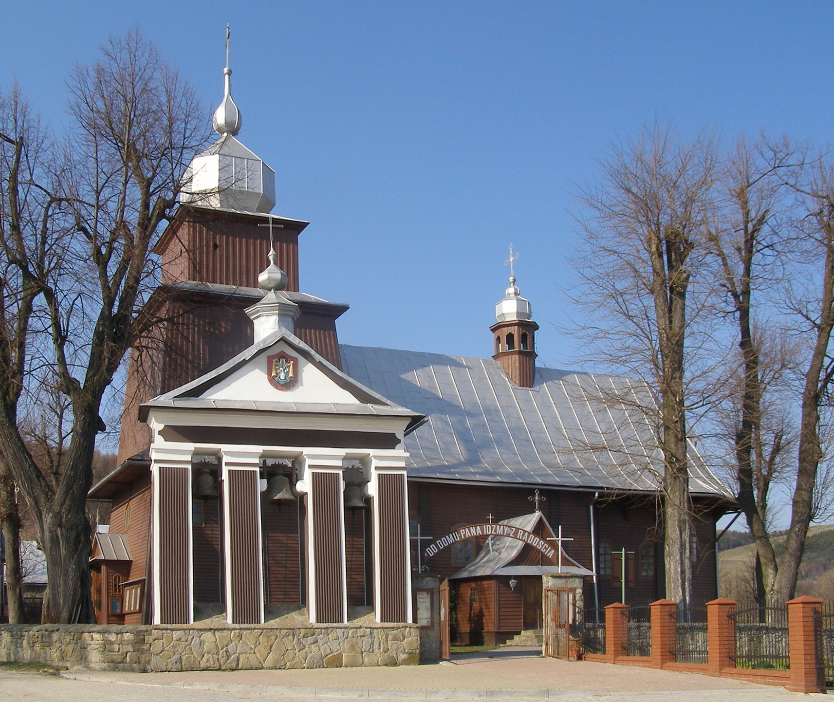 wieś Tylicz